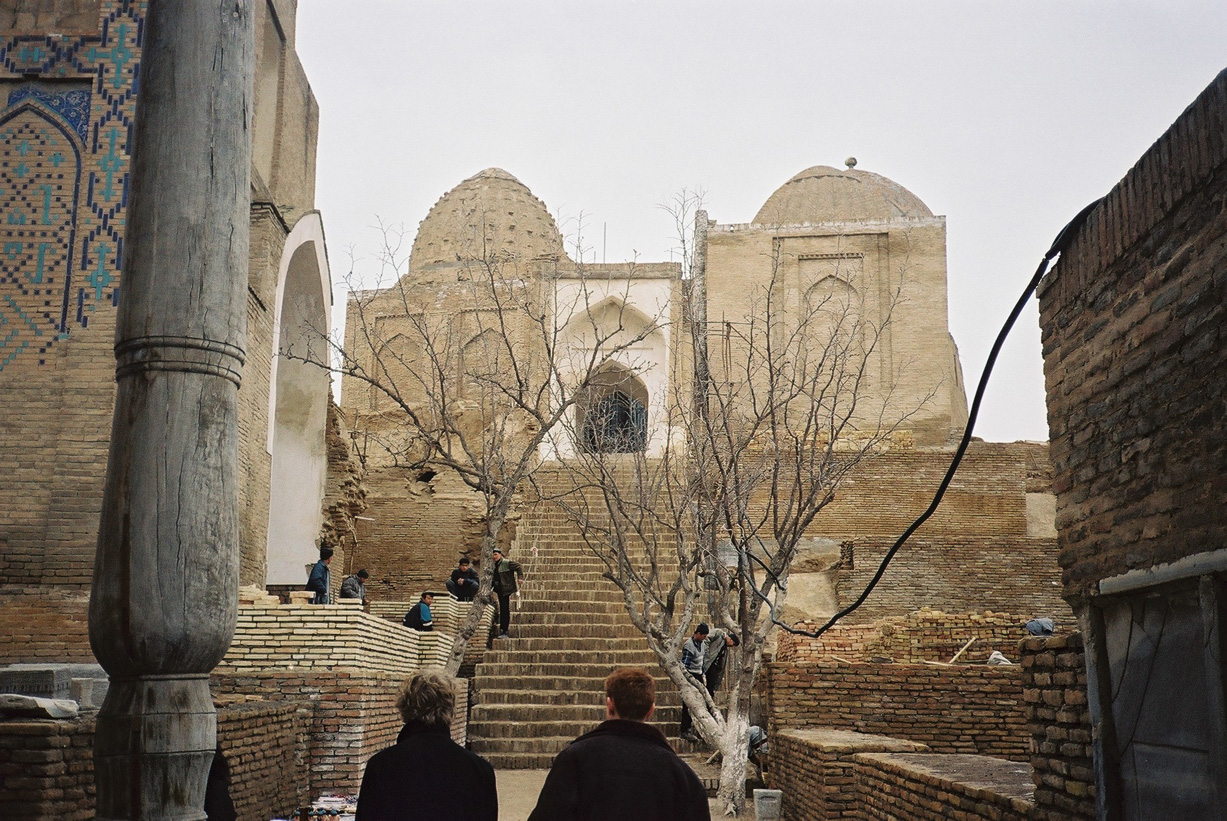 Entrance stairs to Shahr-i-Zindah, Samarkand